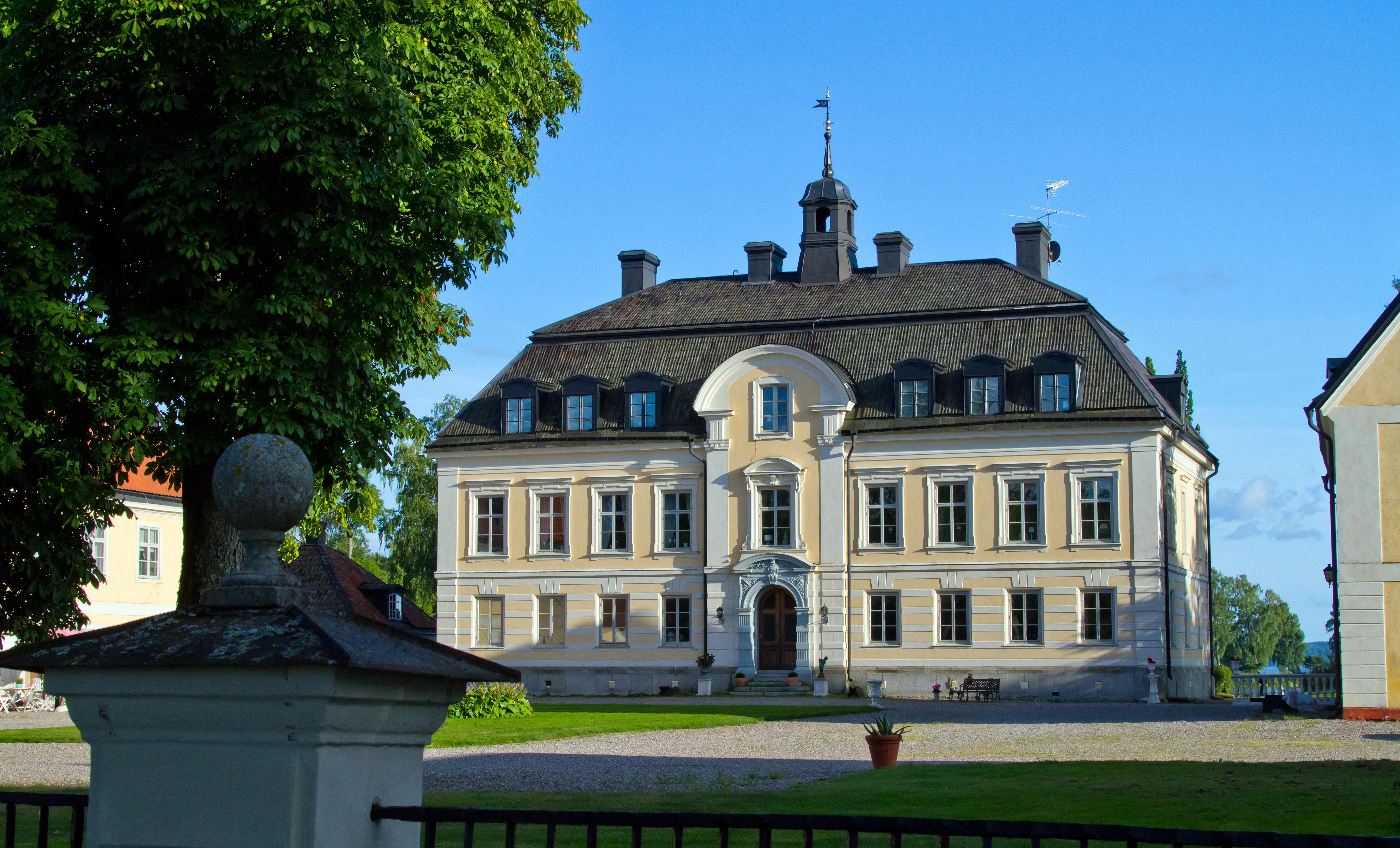 Esplunda herrgård består av 16 byggnader och är ett säteri. Herrgården ligger i Äsplunda.